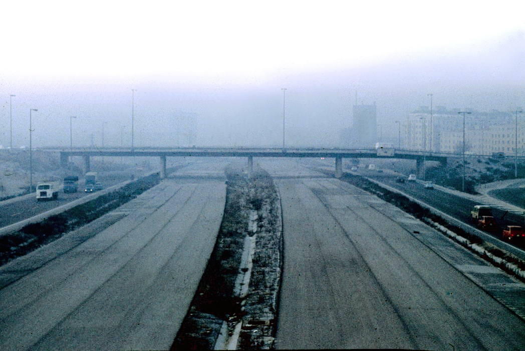 La Avenida de la Paz [hoy M-30] con las calzadas centrales aún sin uso. Madrid (España)